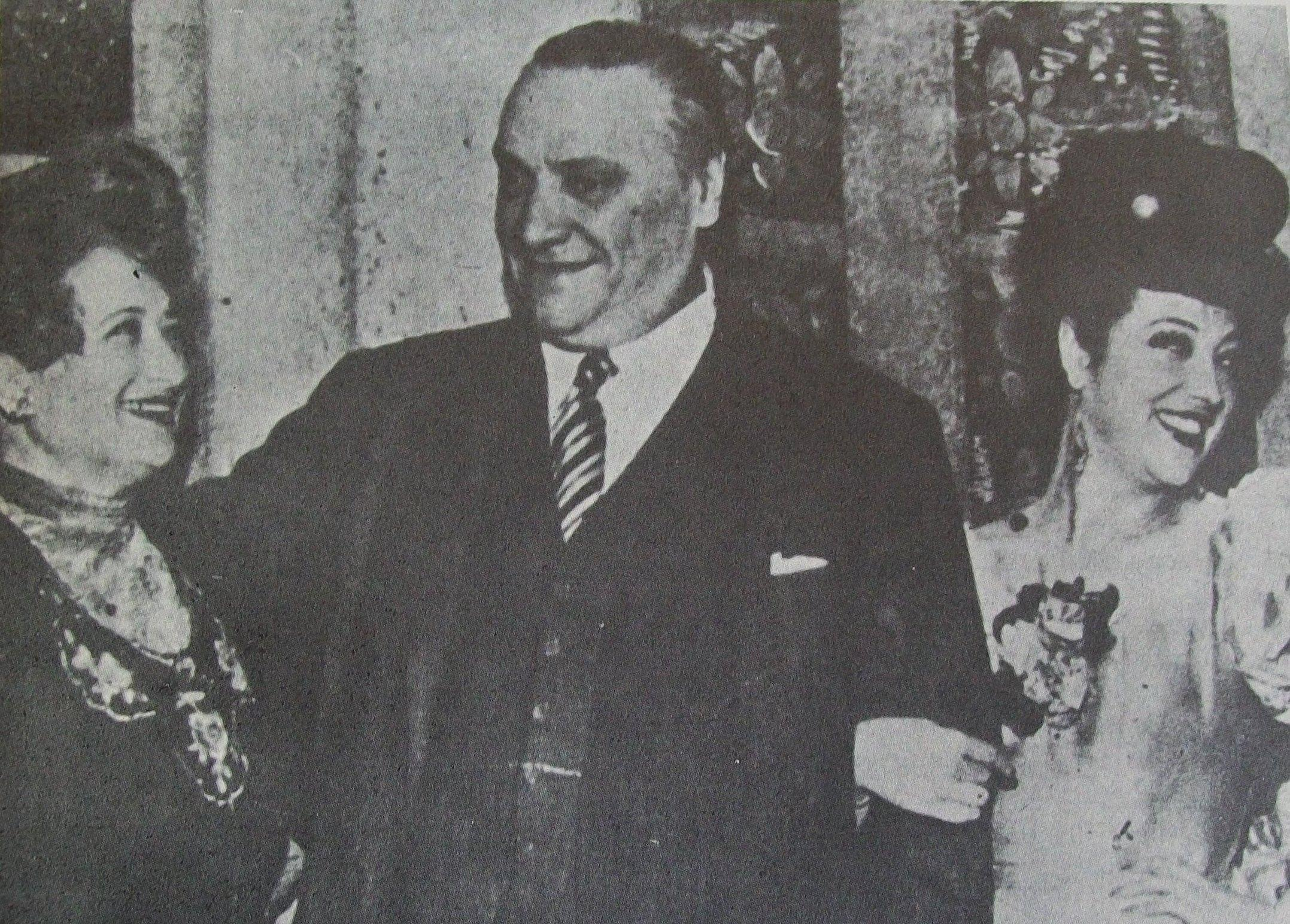 Alberto Vacarezza junto a intérpretes de sus obras en 1946